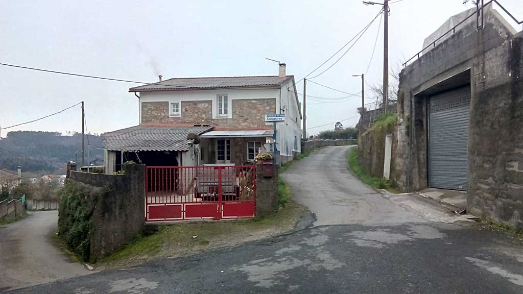 Vista de Curuxeira, Neda.